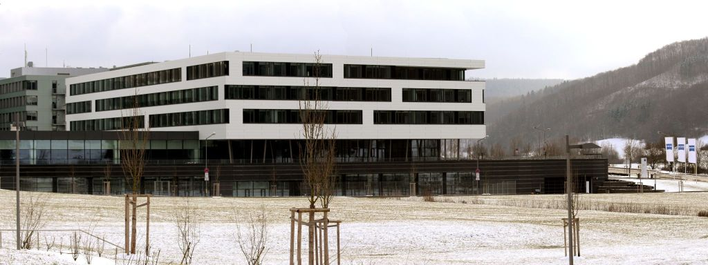 Carl Zeiss Mditec Oerkochen Gebaude 2015